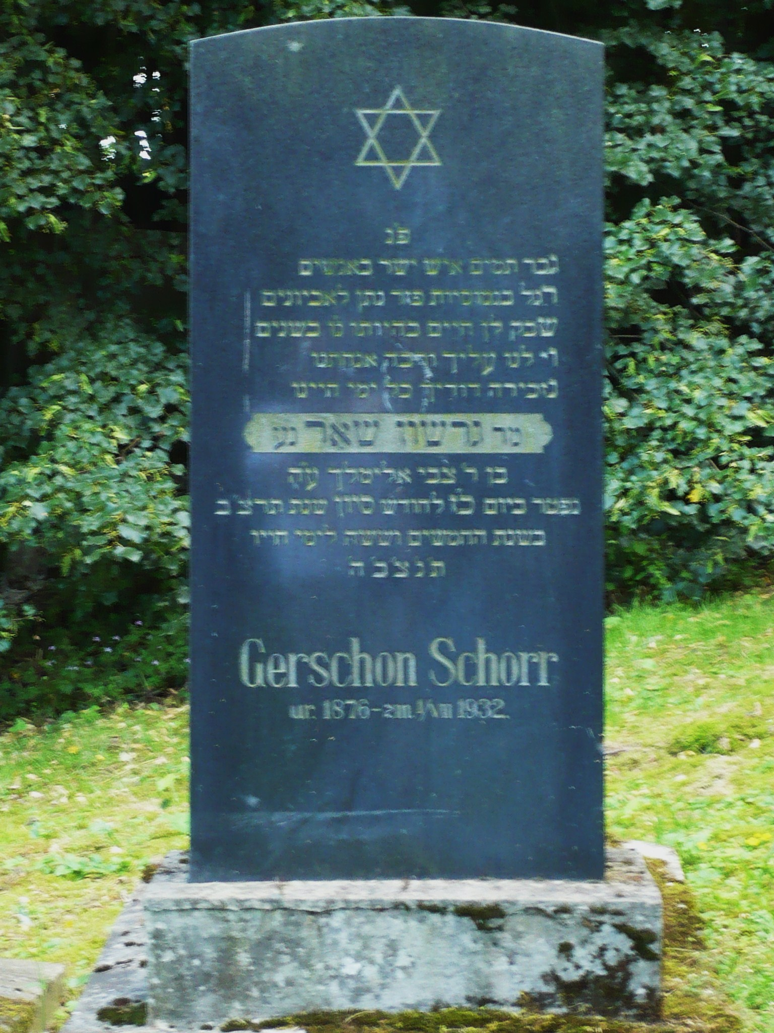 Przemyśl, nowy cmentarz żydowski